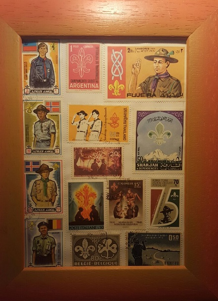 Pietro Di Fontana